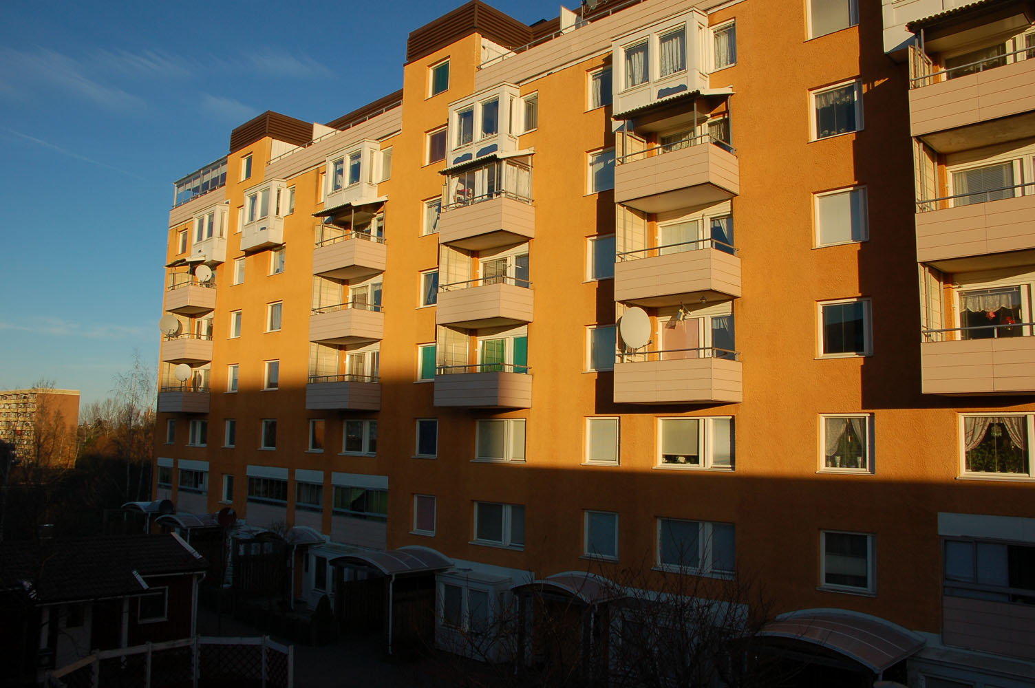 Hovsjö, as seen from Granövägen 53